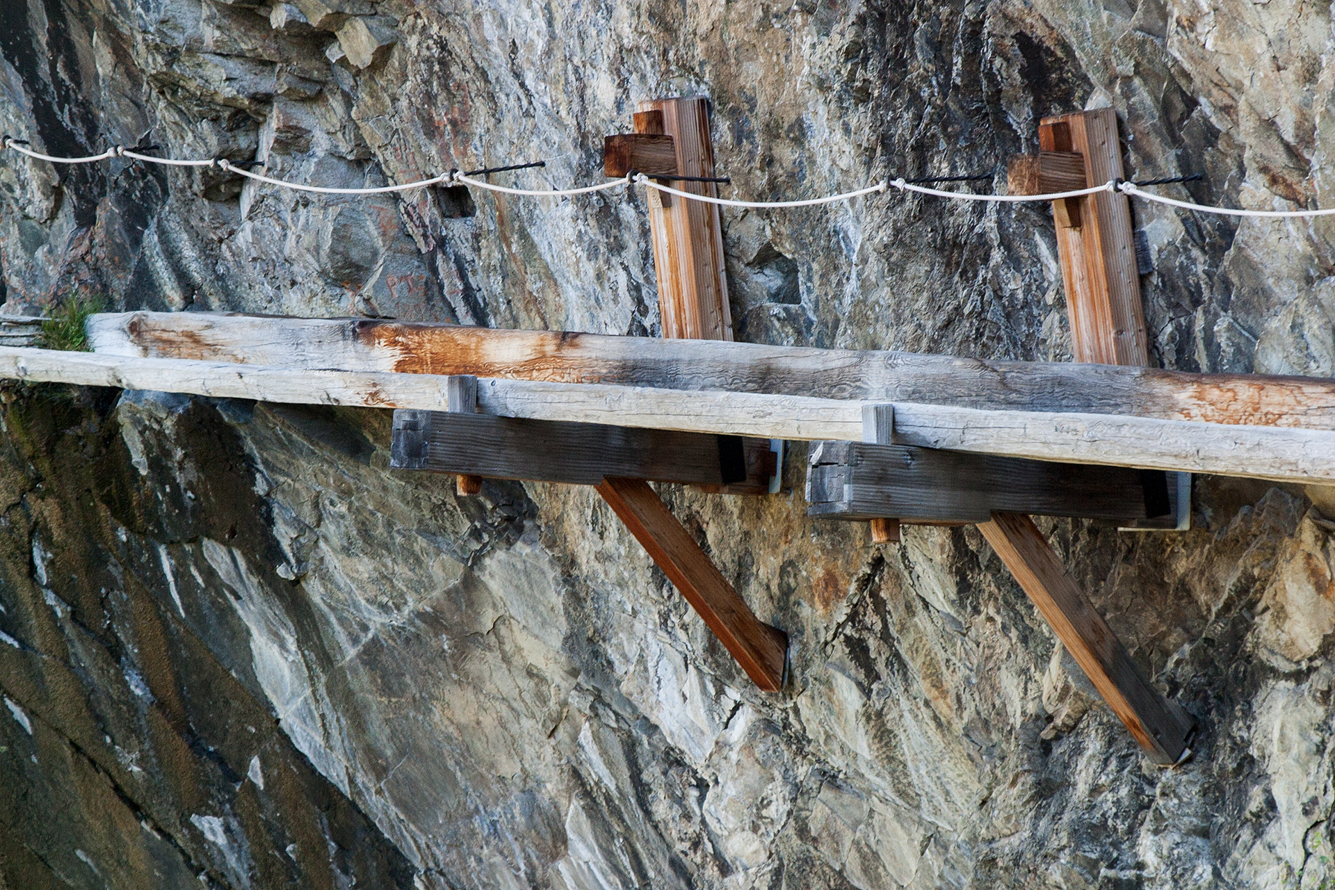 Hängende Suone mit Fusssteg im Baltschiedertal (VS)